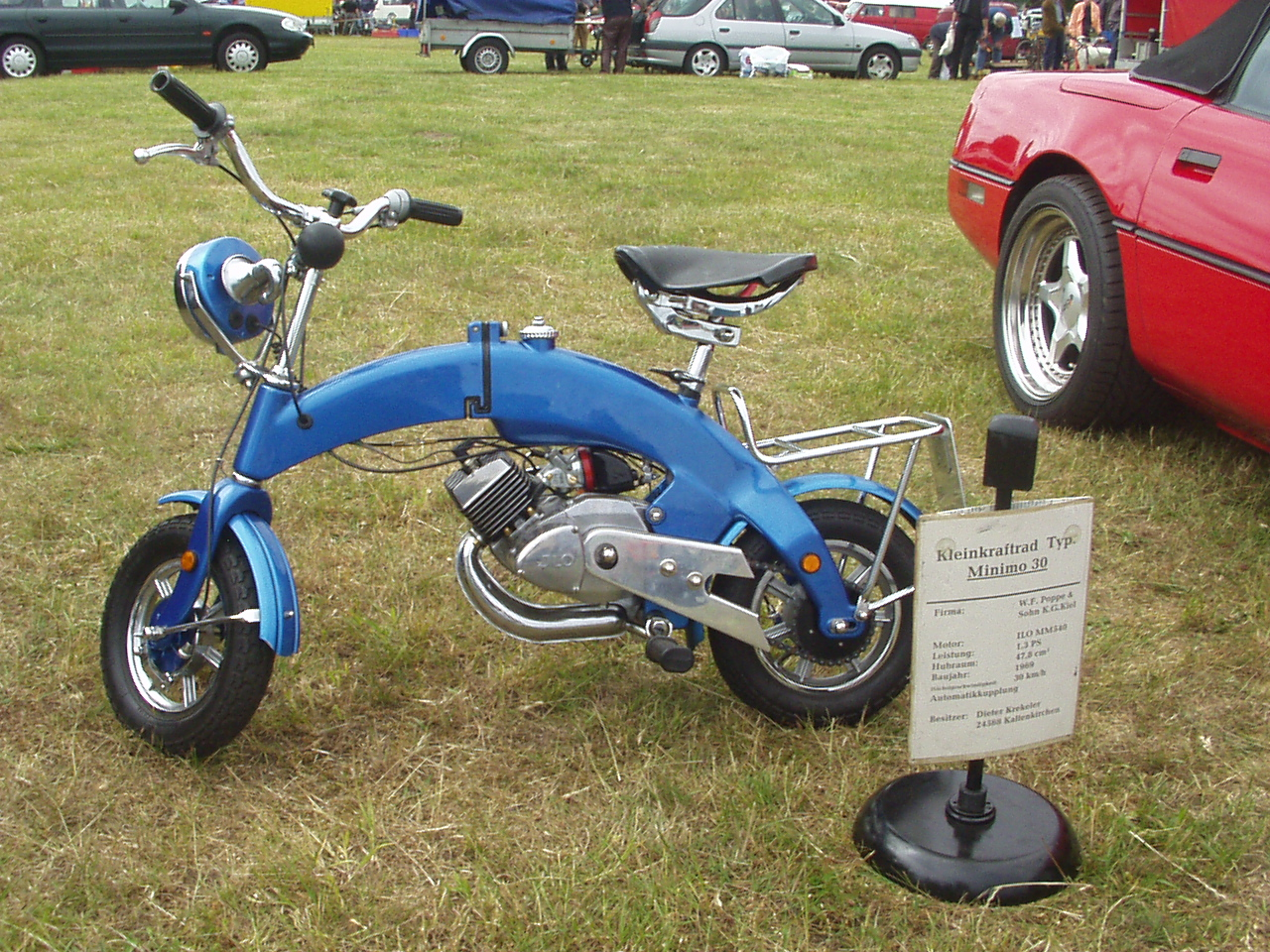 MiniMo 30 - ein faltbares Mofa/Mokick